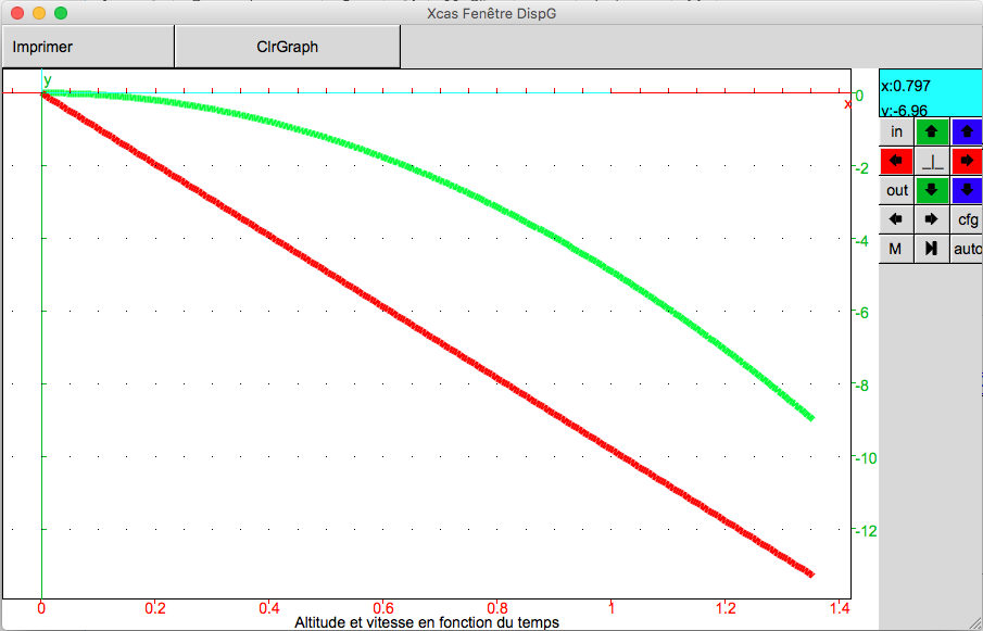 Graphique vitesse et position de la chute sans frottement d'un objet de 9 mètre de haut.